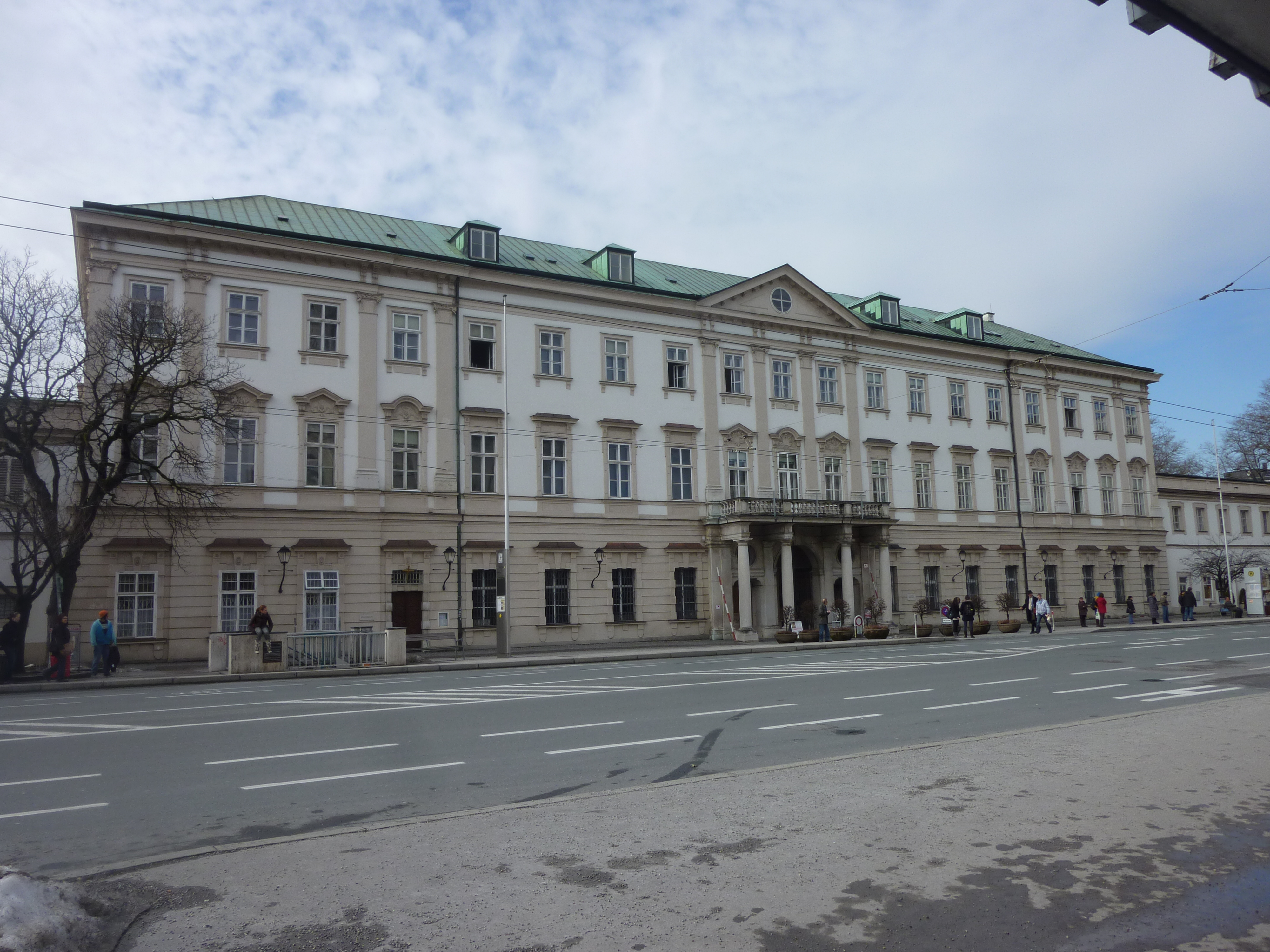 Salzburg by Stefanjurca on Flickr